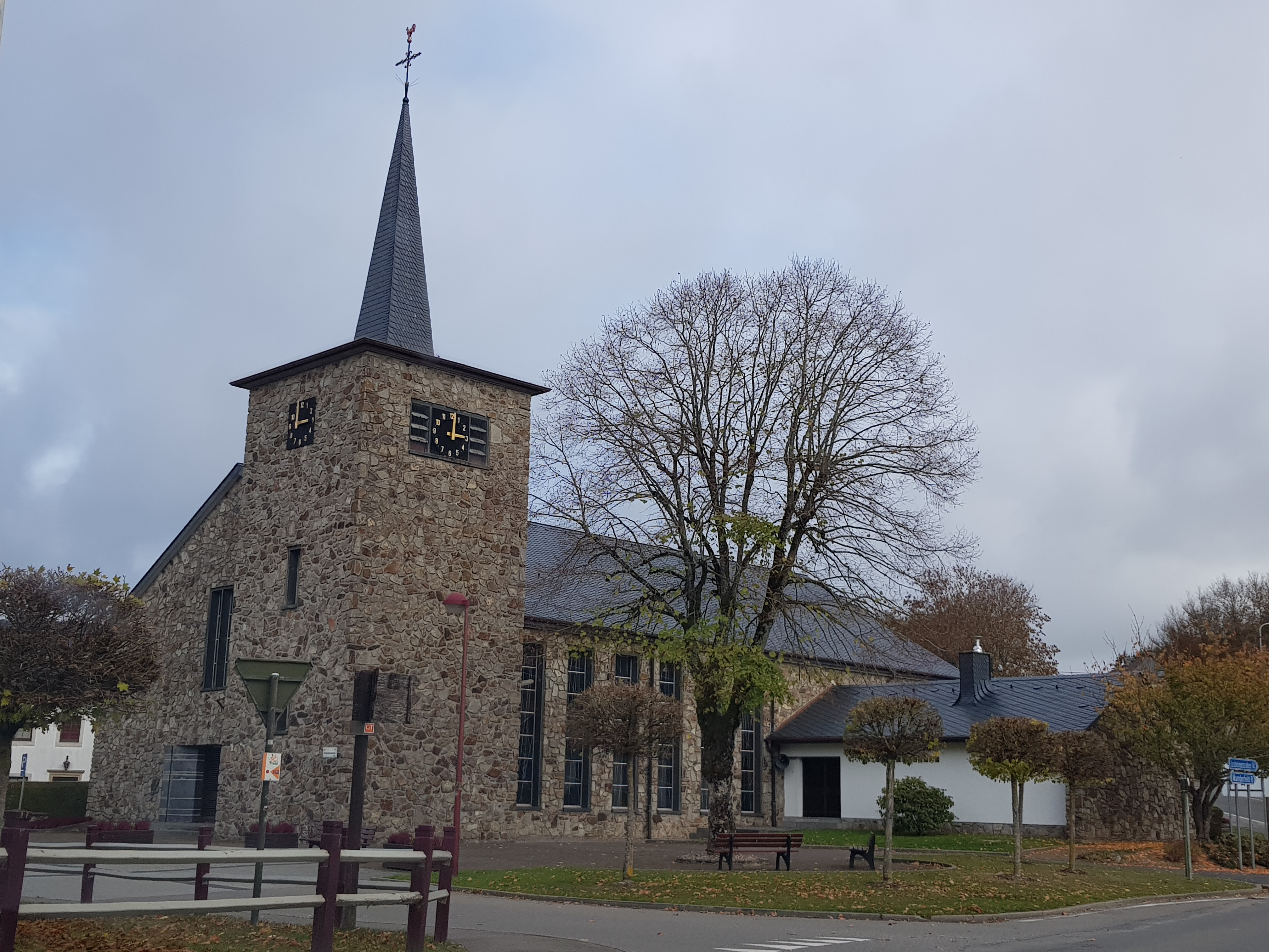 Kirche, Schönberg, Sankt Vith, Belgien